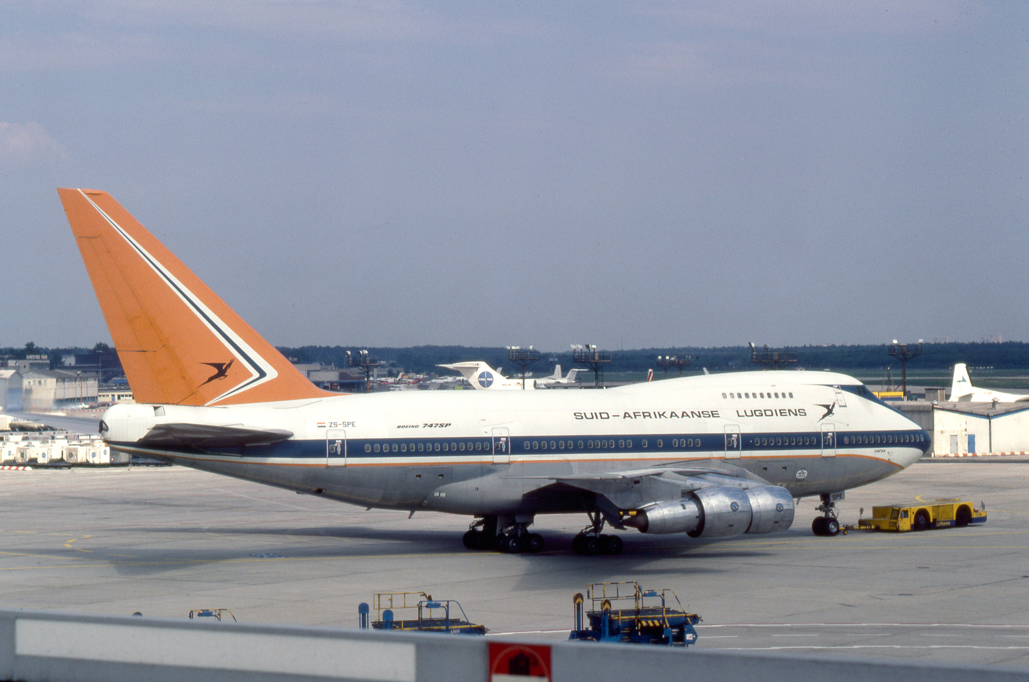 Frankfurt 1980 "Hantam"